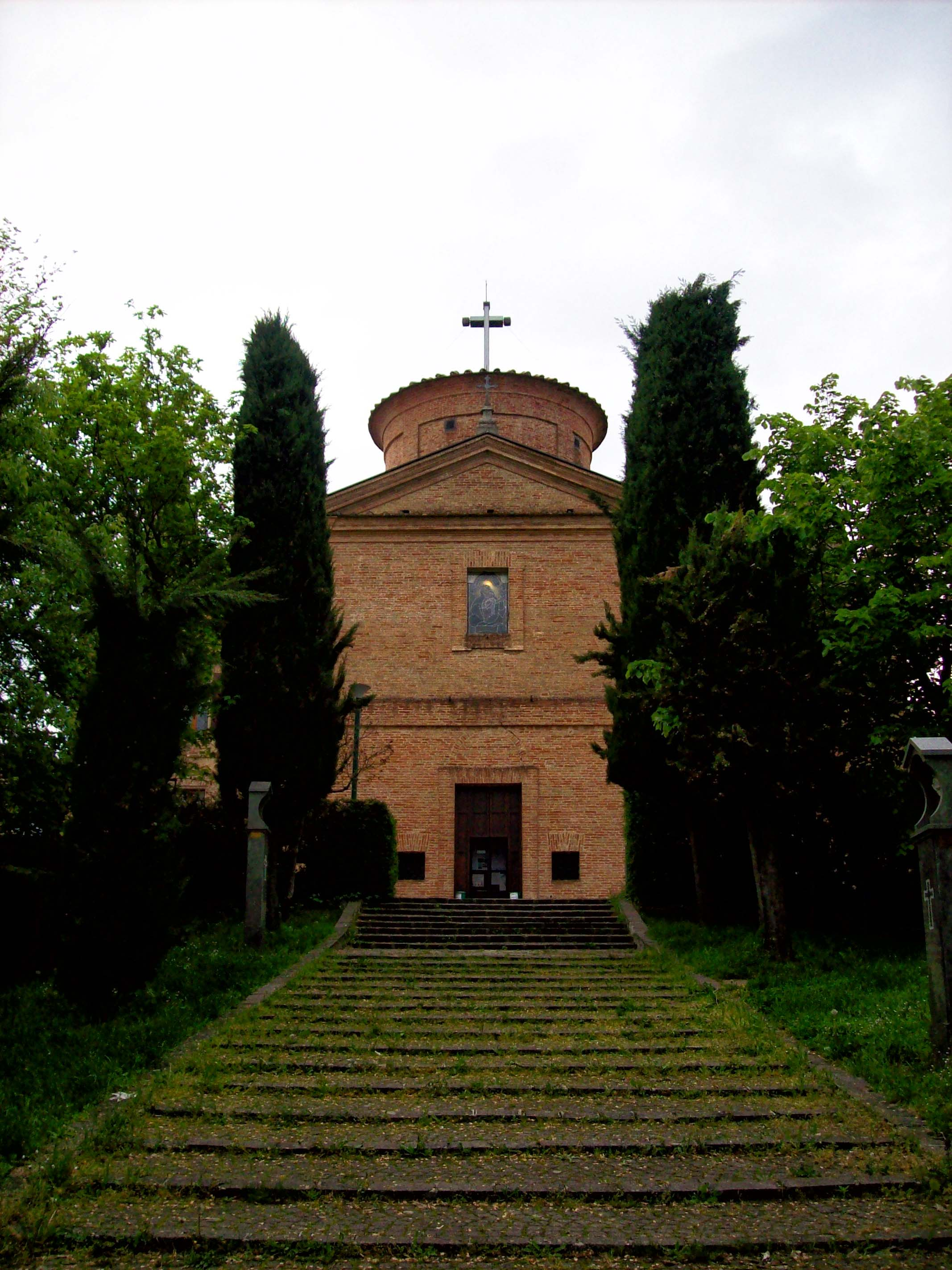 Santuario di Puianello - MIBAC This is a photo of a monument which is part of cultural heritage of Italy.